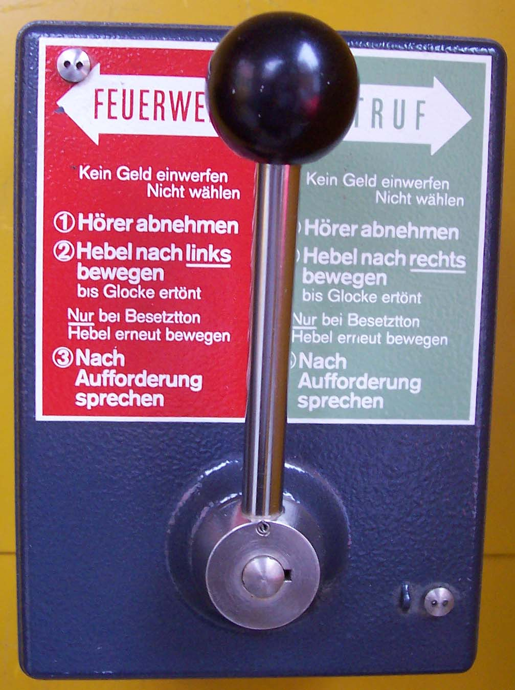 Durch Betätigung des Notrufhebels in einer Telefonzelle konnte man, ohne eine Münze einzuwerfen und ohne eine Notrufnummer zu wählen, die Feuerwehr (Hebel nach links auf rot) bzw. Polizei (Notruf) (Hebel nach rechts auf grün) erreichen. Exponat des Postmuseums in Erbes-Büdesheim aufgenommen von Benutzer:Kandschwar am 11. September 2005